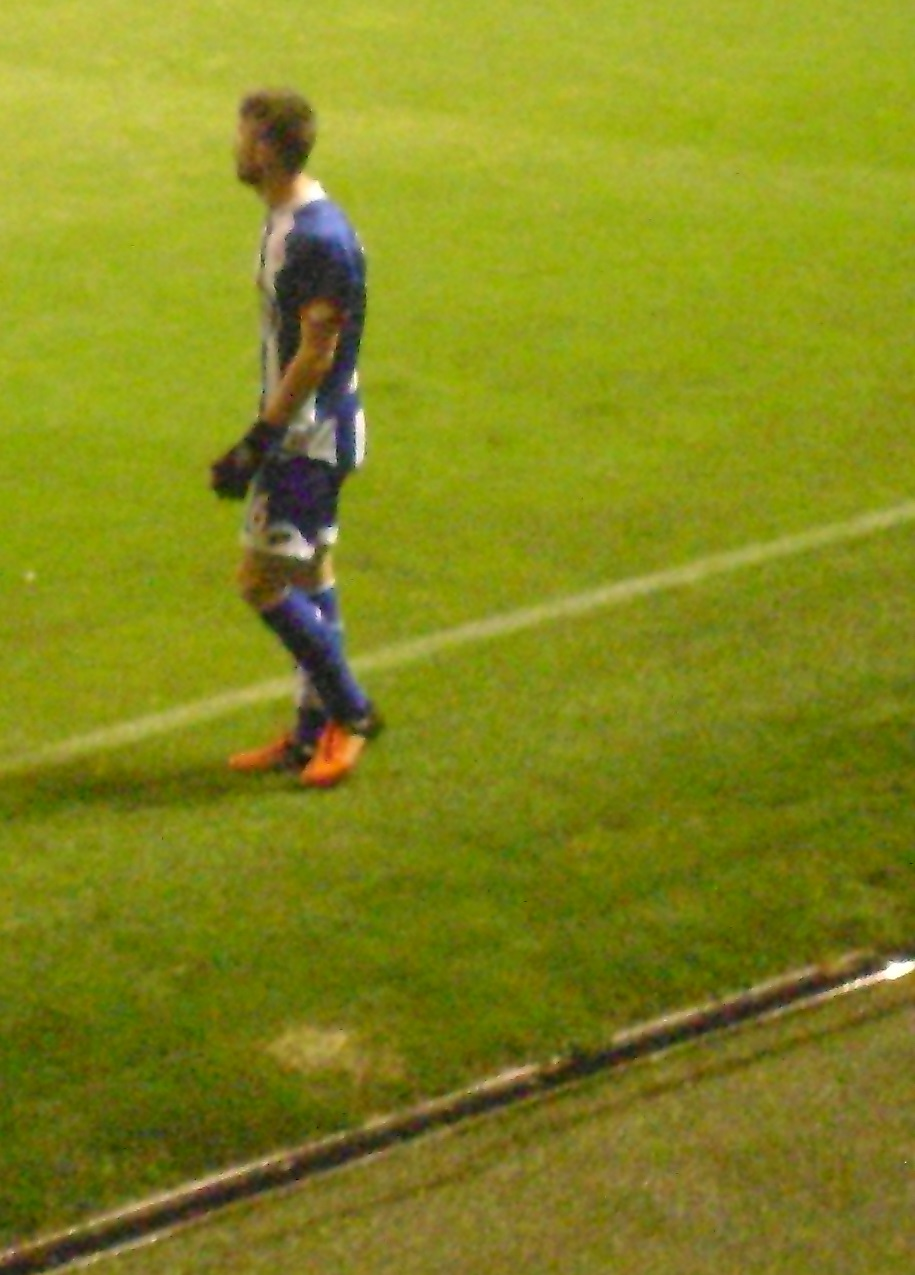 Luisinho